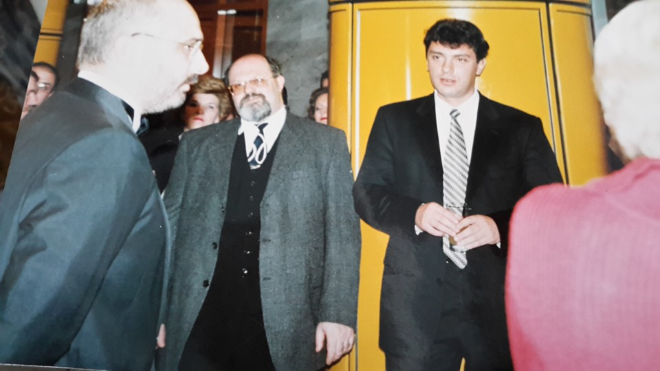 Эдуард Фияксель и Борис Немцов